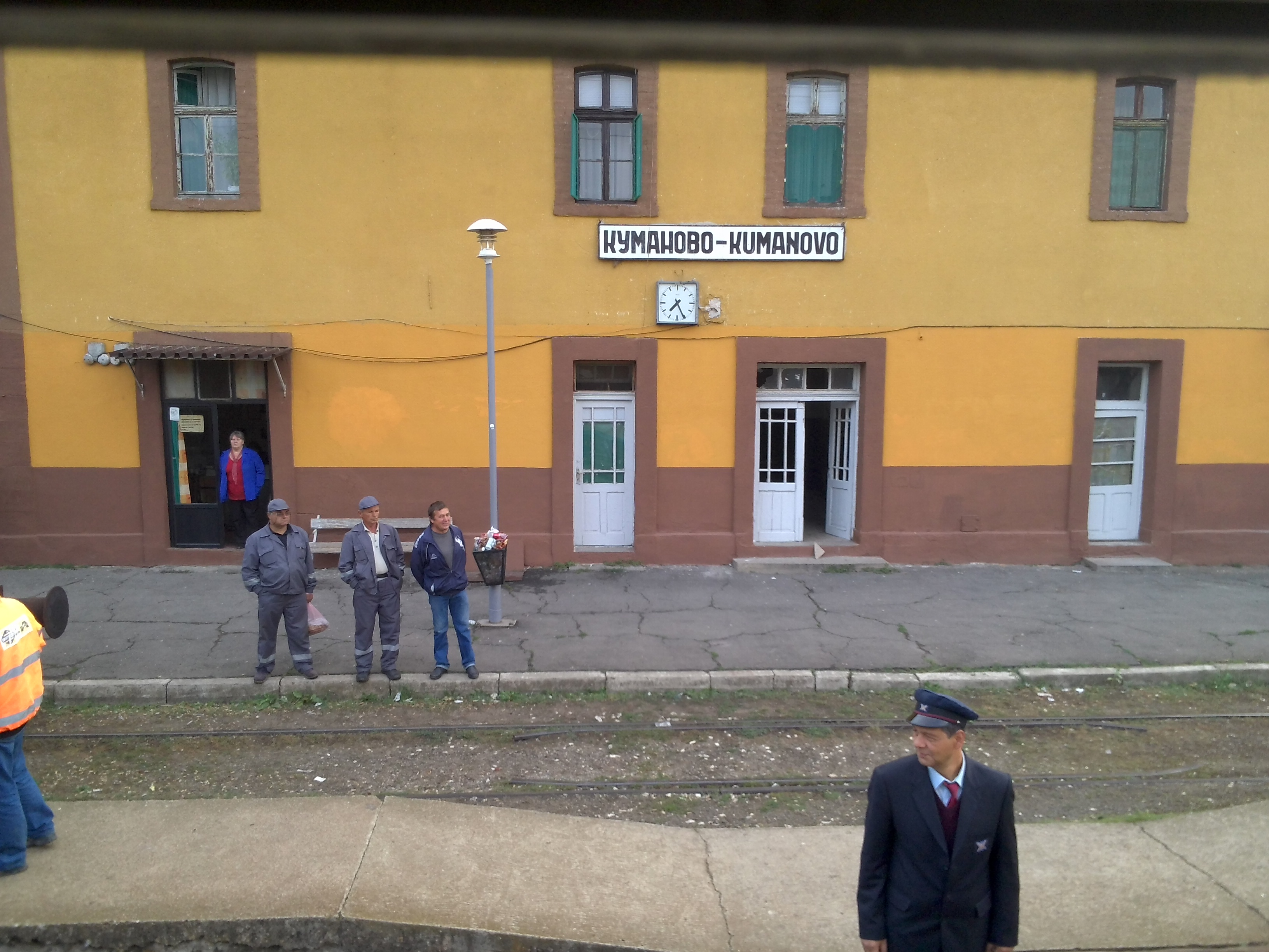 ст. Куманово